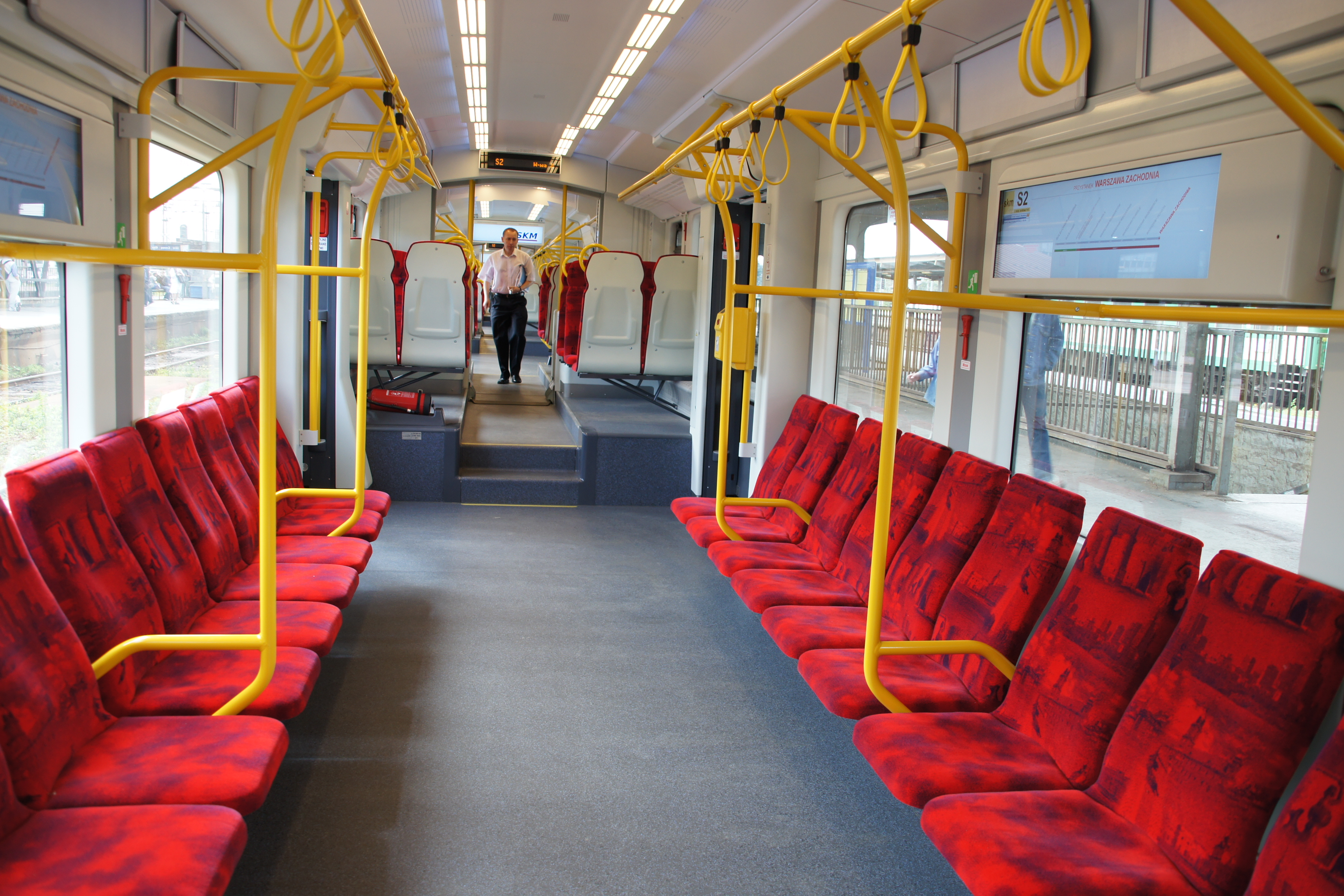 Siedzenia w pociągu "Elf" 27WE